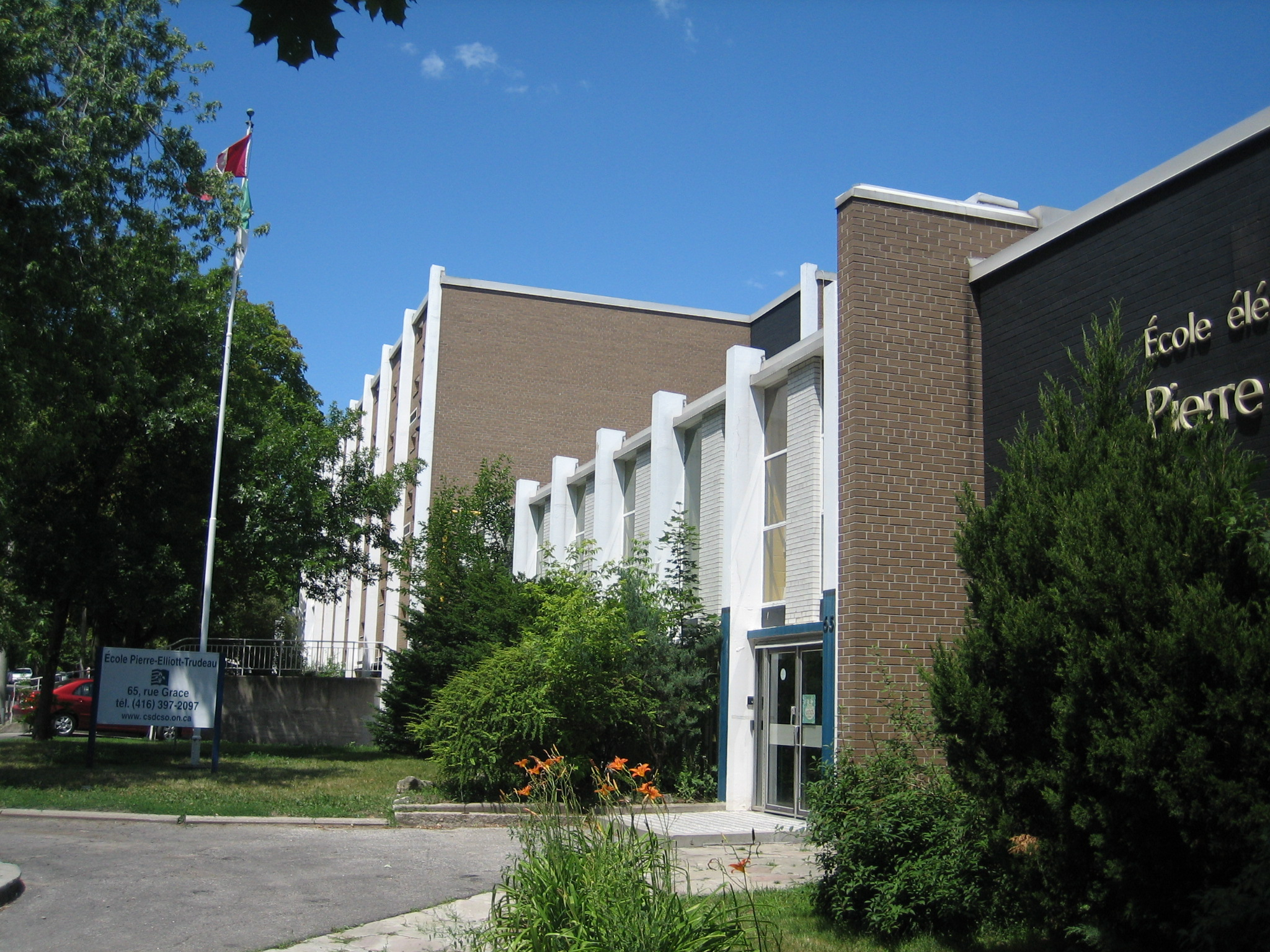 École élémentaire Pierre-Elliott-Trudeau in Toronto